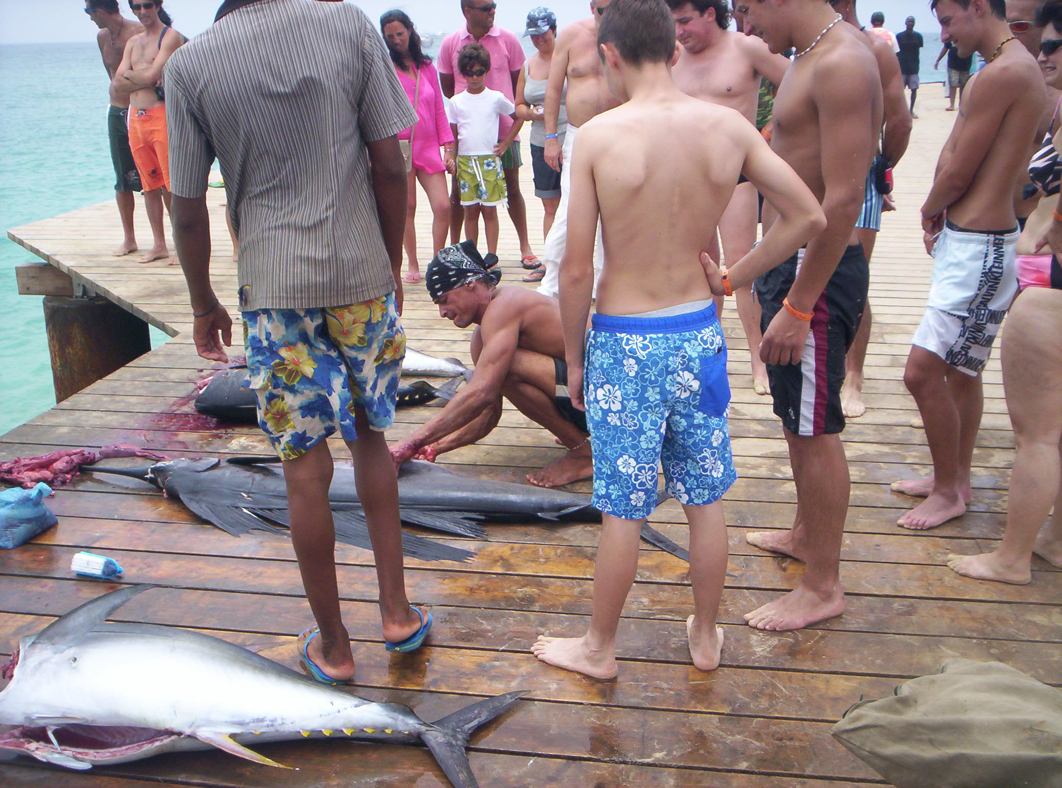 Peixes no pontão de Santa Maria, na Ilha do Sal, em Cabo Verde